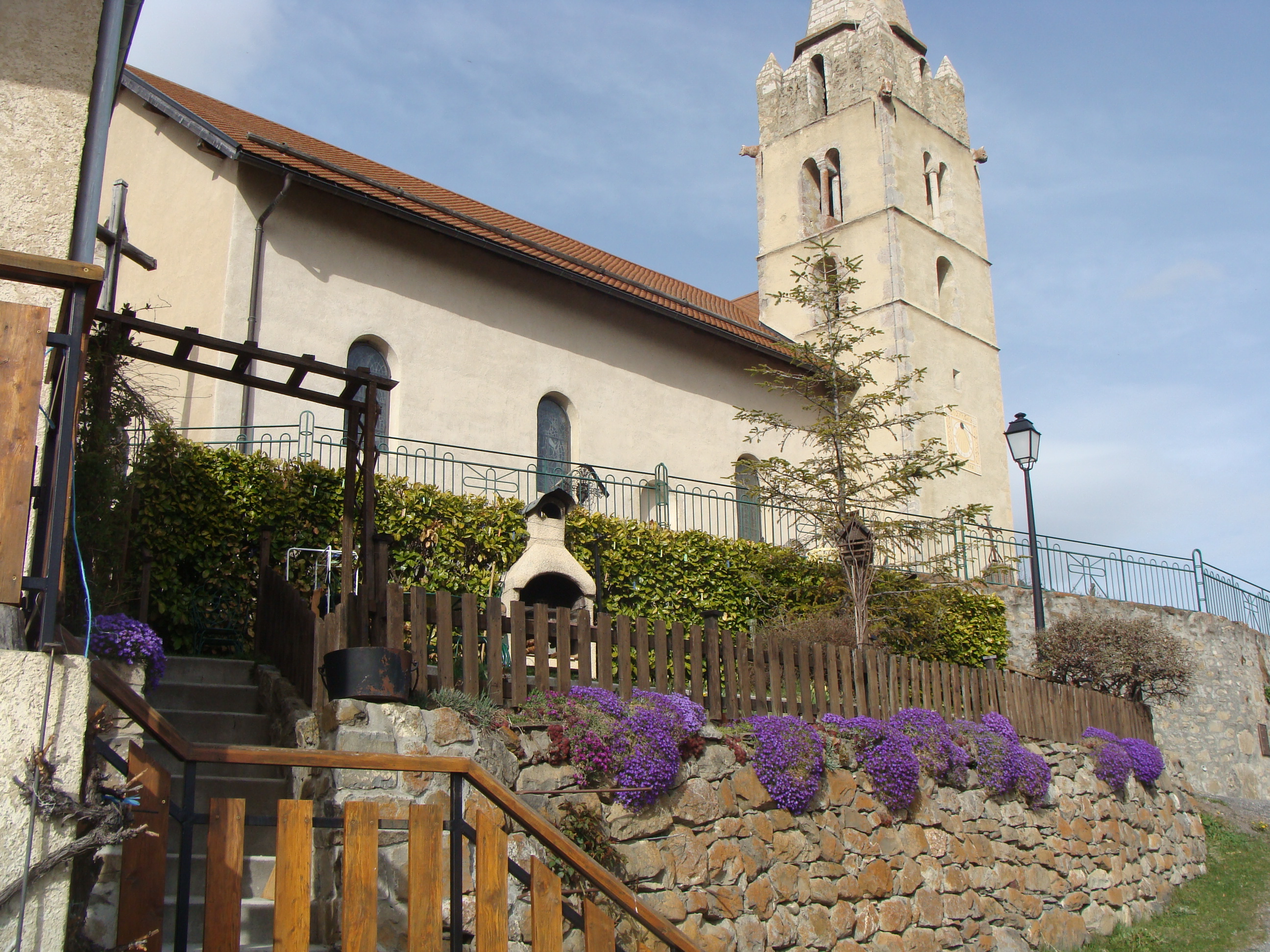 Puy-Saint-Eusèbe (Hautes-Alpes) au printemps.